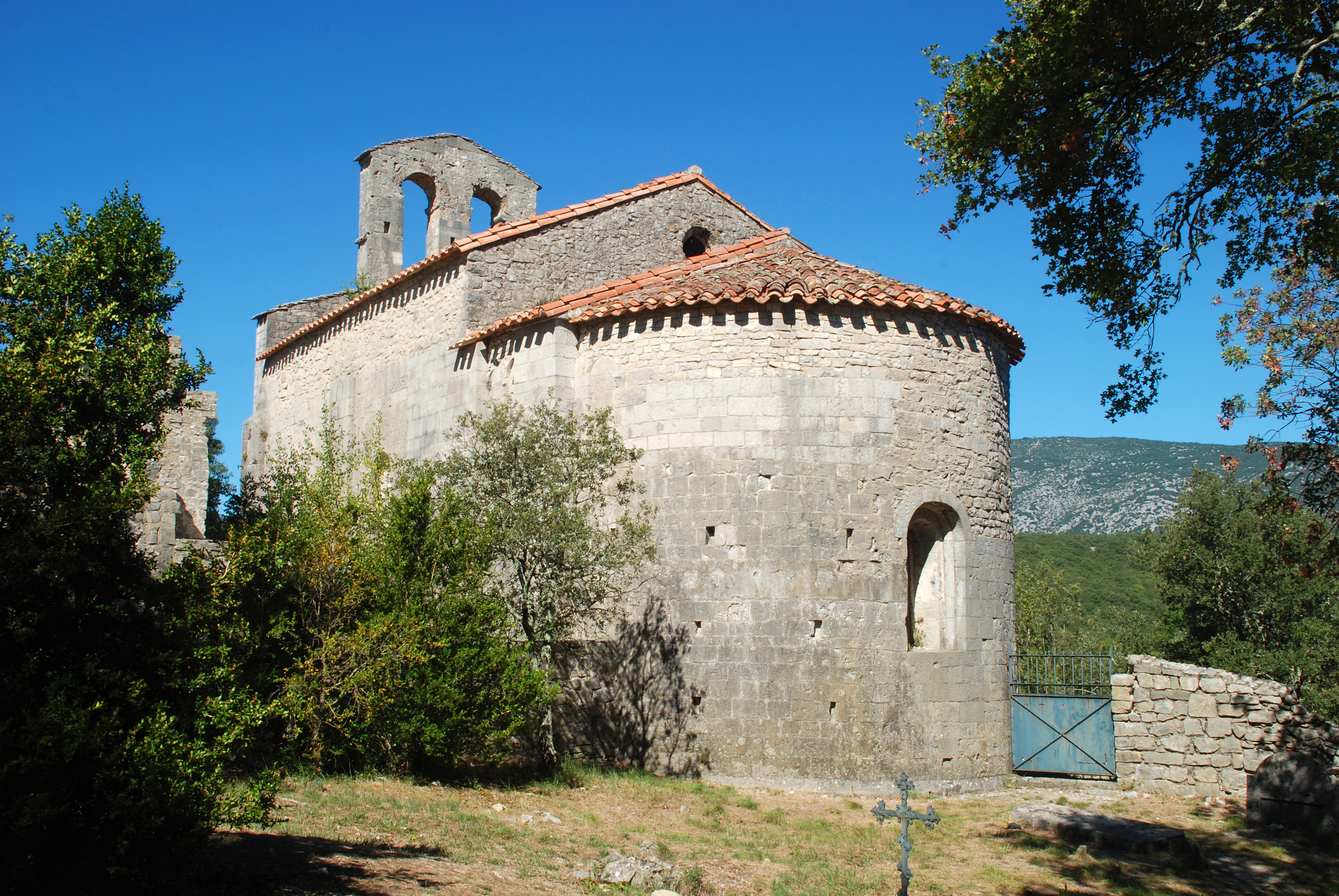 France - Hérault - Chapelle Saint-Étienne d'Issensac